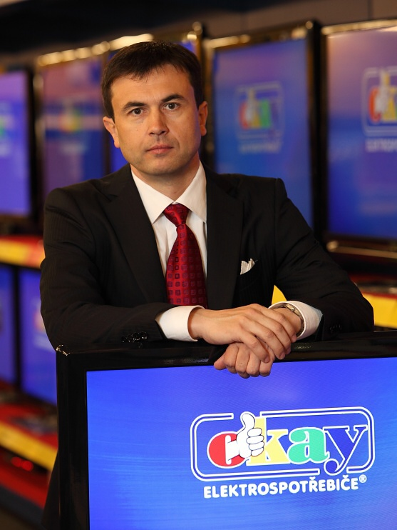 Oficiální profilová fotografie